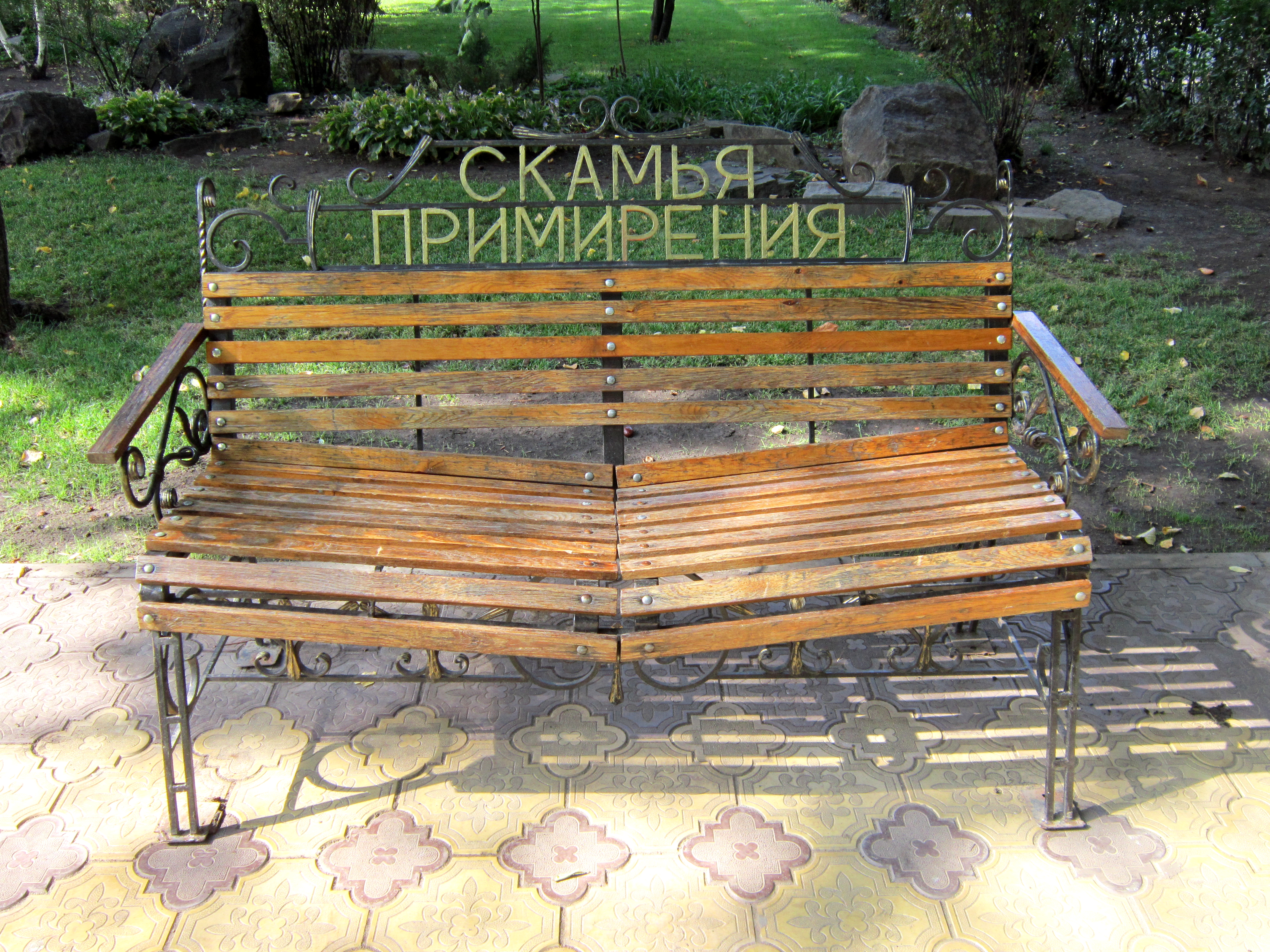 Скамья Примирения, Ростов-на-Дону